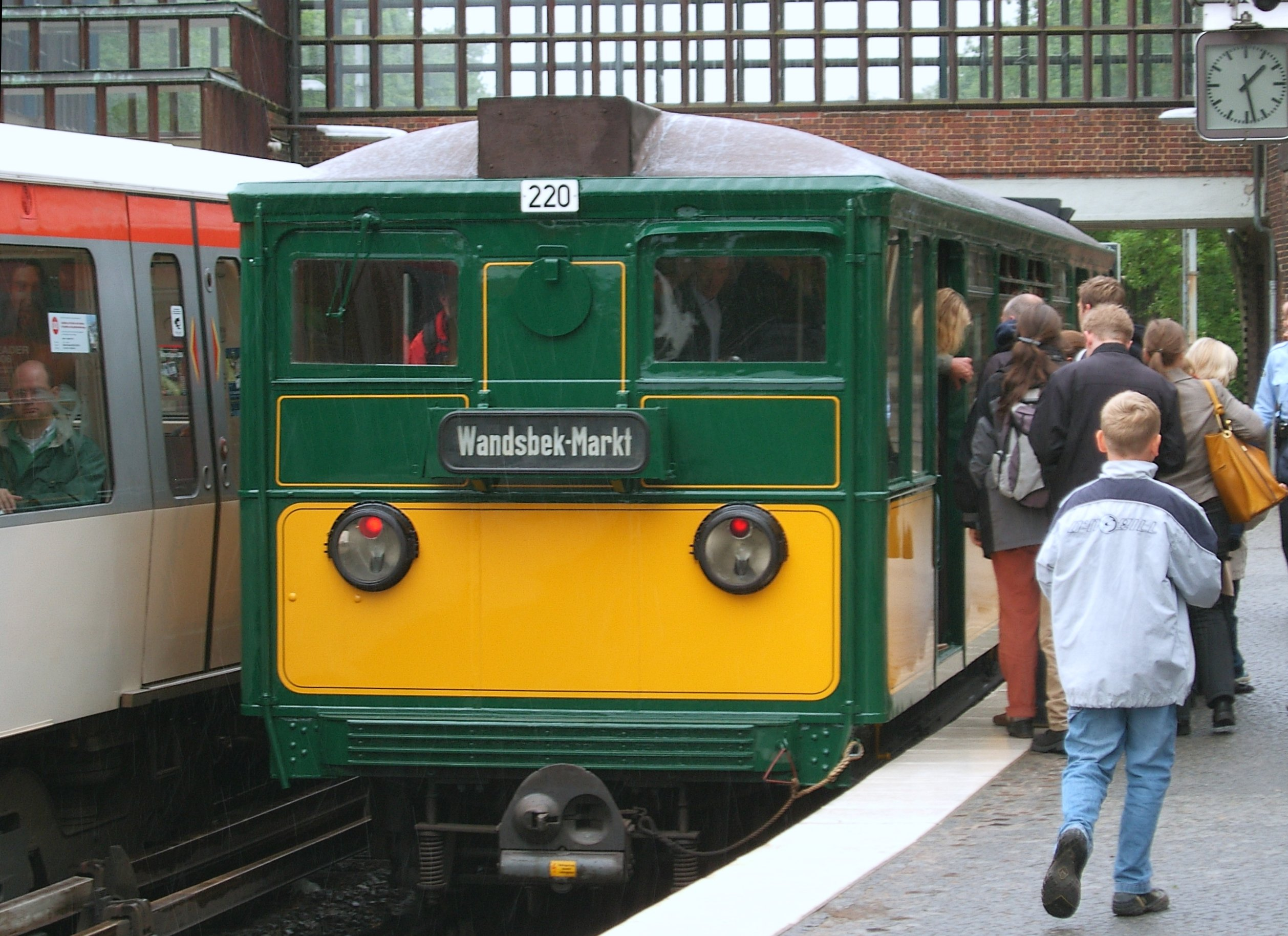 Hamburg, Eppendorf, U-Bahnhof, Kellinghusenstraße, Wagen T220